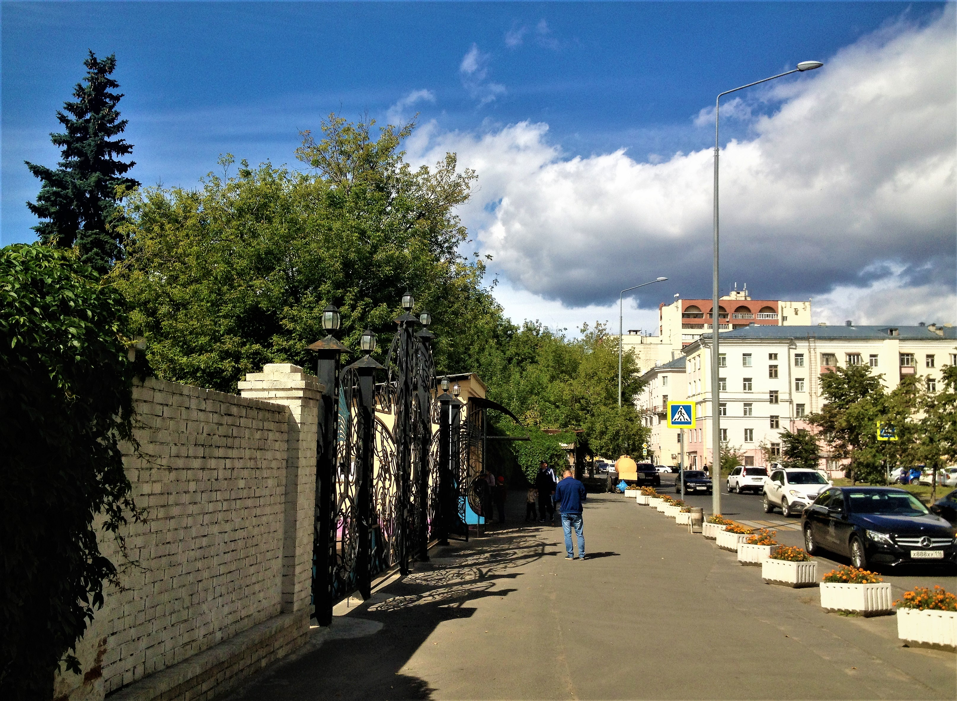 Проезжая часть улицы Хади Такташа между улицами Дальней и Даурской в районе Казанского зооботанического сада (г. Казань).